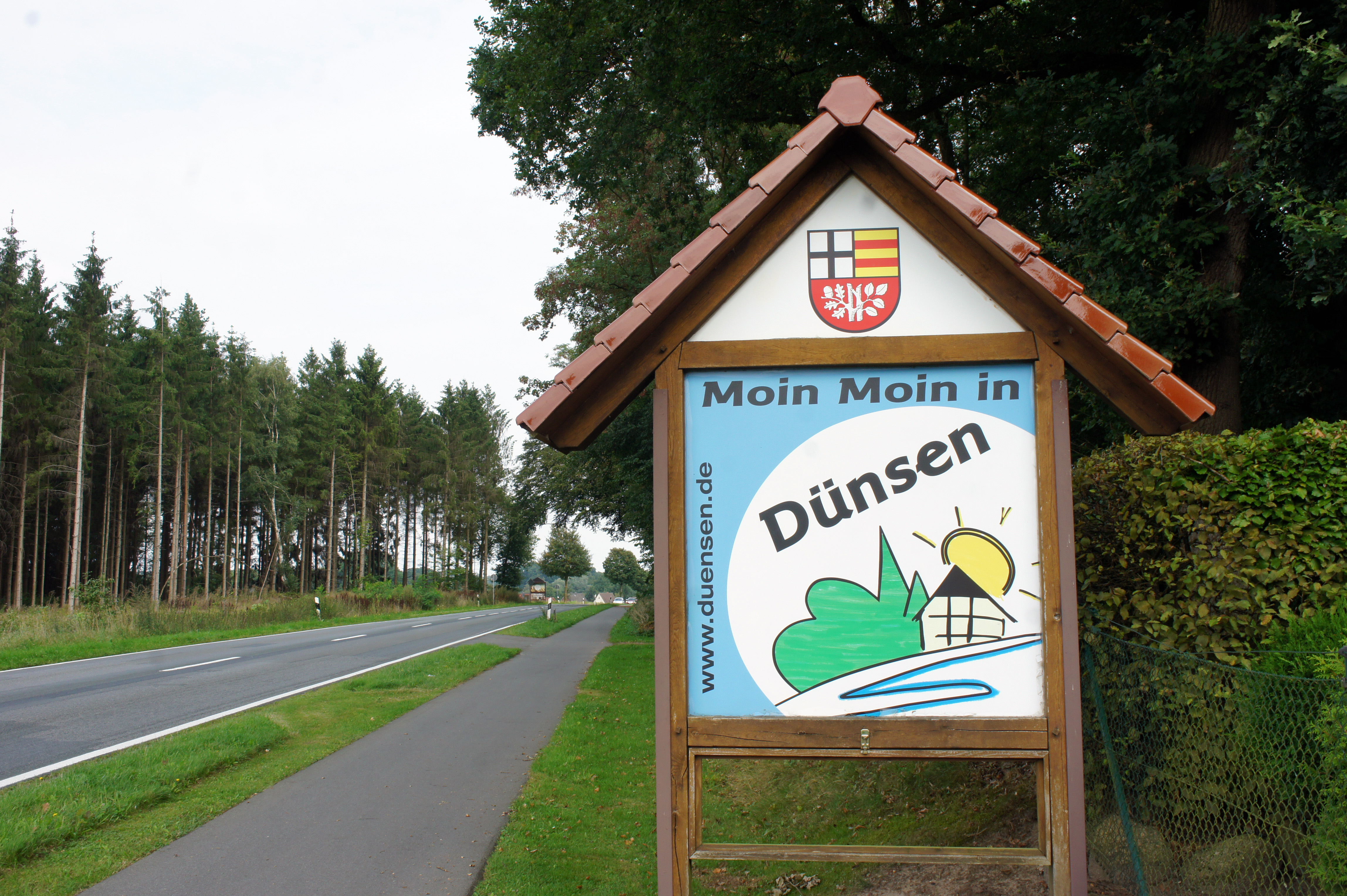 Begrüßung am Ortseingang von Dünsen